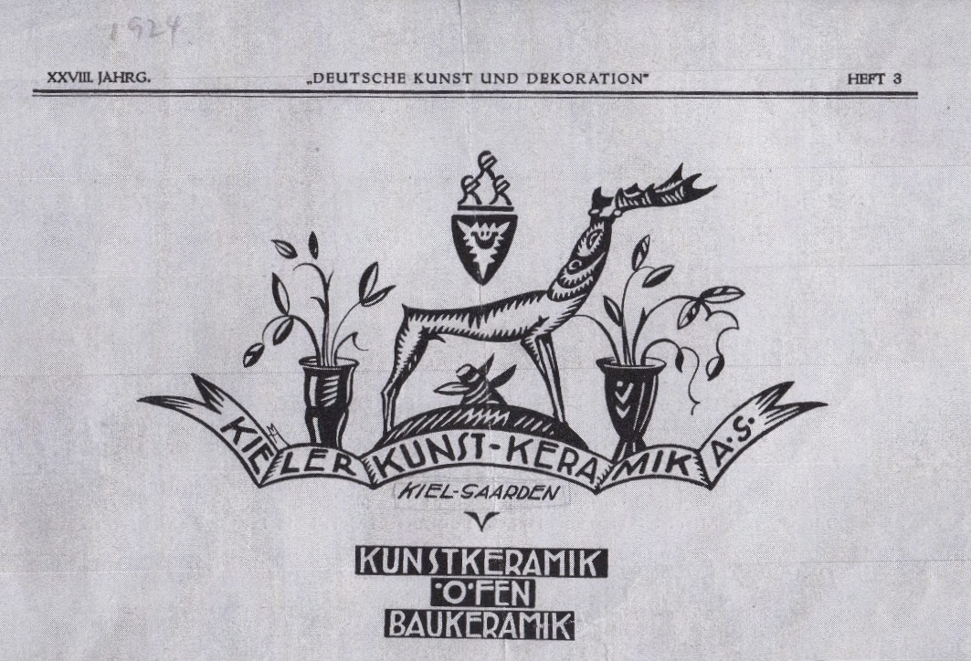 Annonce der Kieler Kunst-Keramik AG in: Koch (Hrsg.) „Deutsche Kunst und Dekoration", XXVIII. Jahrg., Heft 3, 1924; Entwurf: Hedwig Marquardt (Monogramm über dem Schriftband links), 1924. Privatsammlung, London.